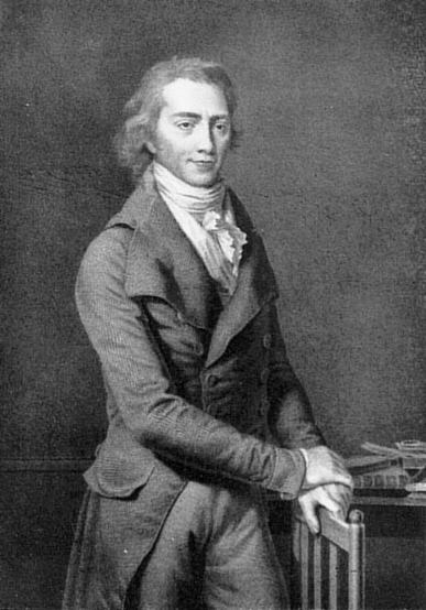 Christoph Wilhelm Hufeland (1762 - 1836) Mediziner Stich von F.Müller nach dem Gemälde von Fr.A.Tischbein. Leibarzt Carl Augusts in Weimar (und auch Goethes Arzt) und Professor an der Universität Jena, seit 1801 an der Universität Berlin. Von vorteilsloser Stellung innerhalb der Mdeizin, wirkte er durch praktische Tätigkeit als Arzt, Organisator und Schriftsteller ("Makrobiotik"). Er war in Weimar (1791 usw.) Mitglied der Freitagsgesellschaft, eines privaten wissenschaftlich-literarischen Zirkels, dem Goethe vorstand.